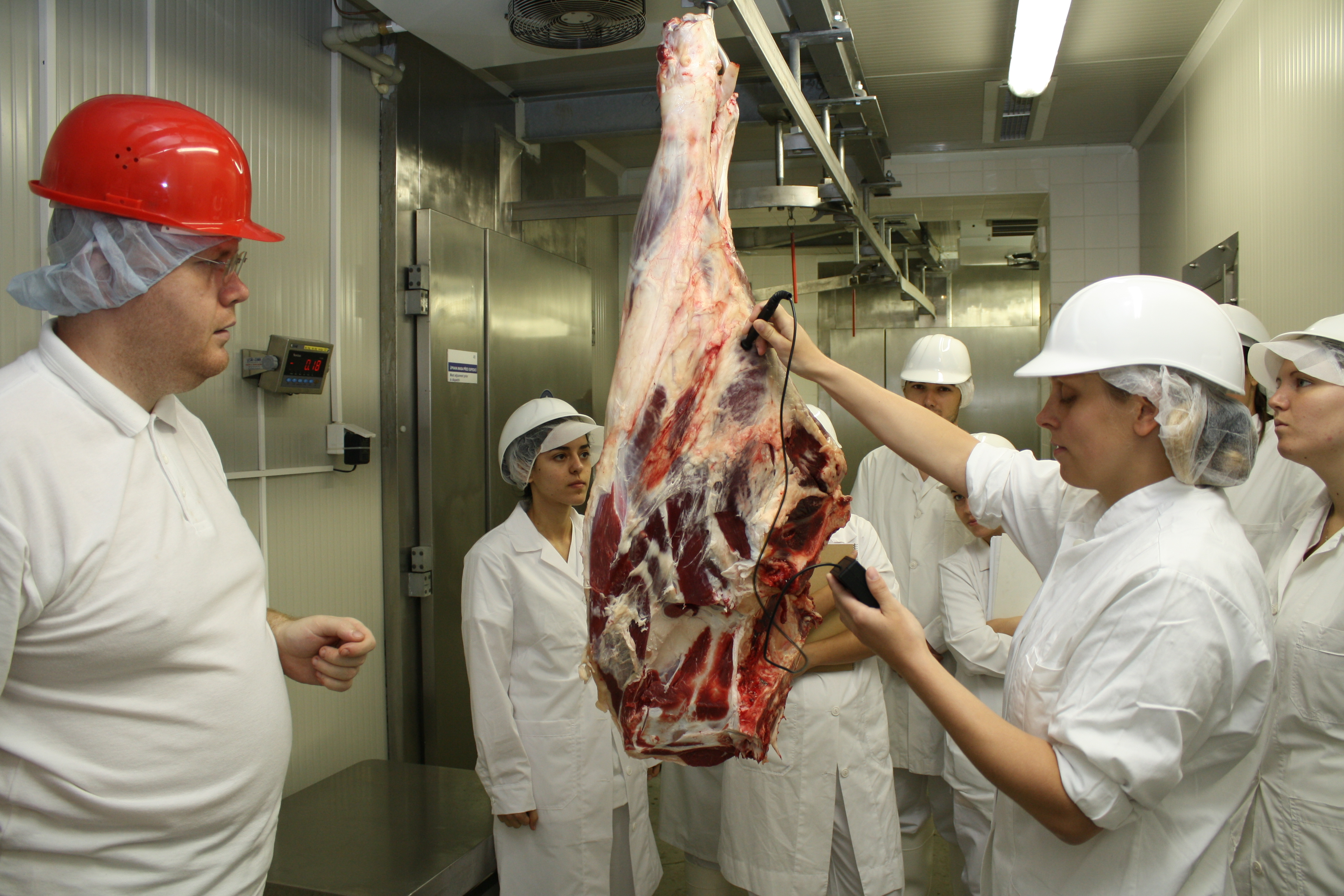 Součástí studia jsou i praktická cvičení